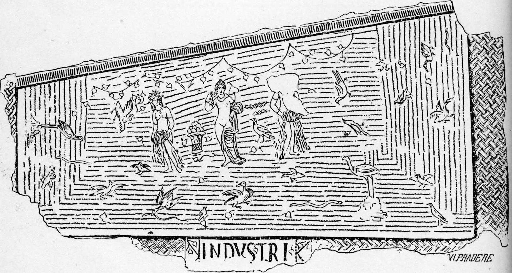 Mosaïque de la maison d'Industrius à Uthina (Oudna) - Musée du Bardo